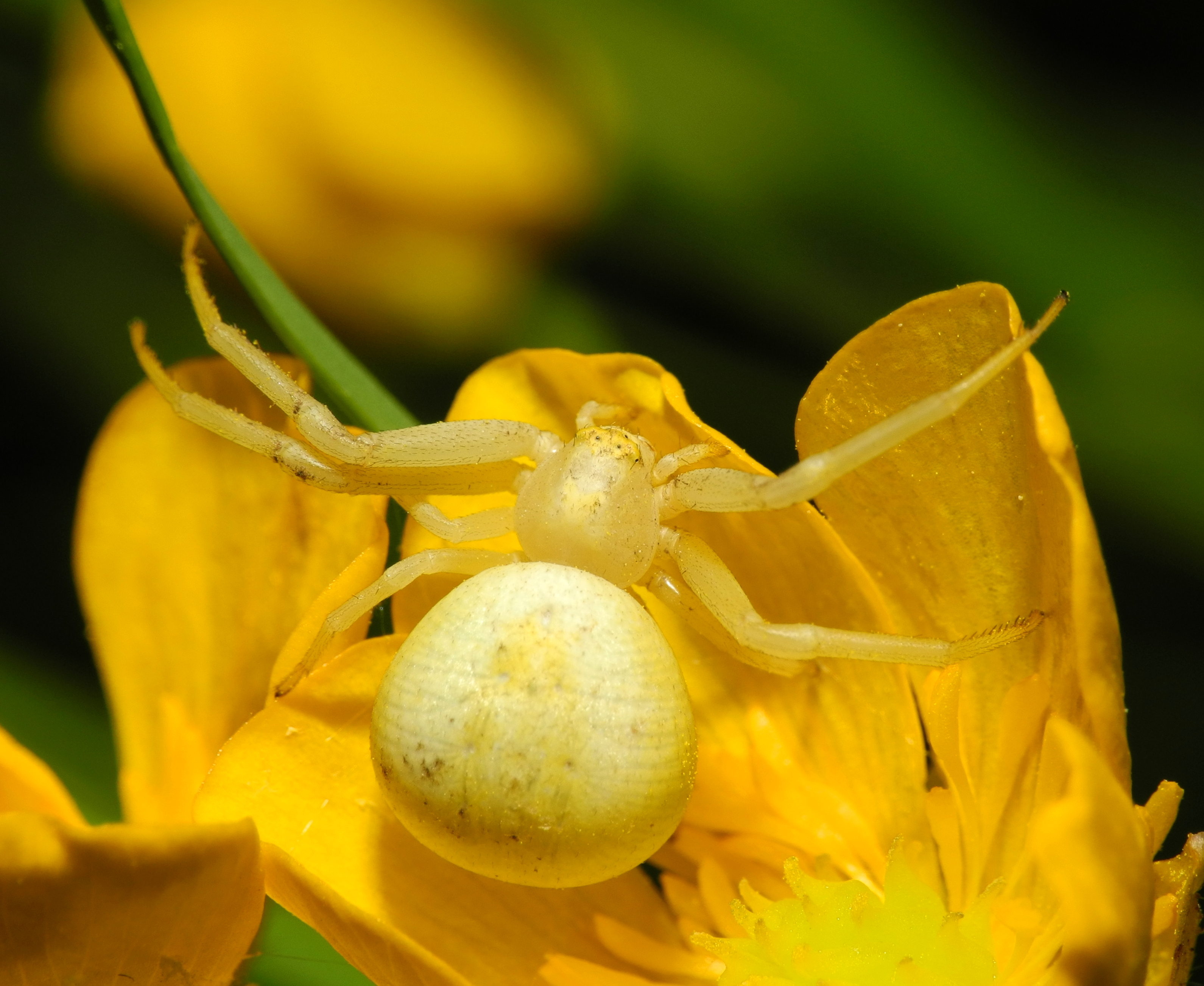 Misumena vatia dans une fleur de renoncule (Ranunculus sp.). Image prise avec la bonnette Raynox DCR-250.